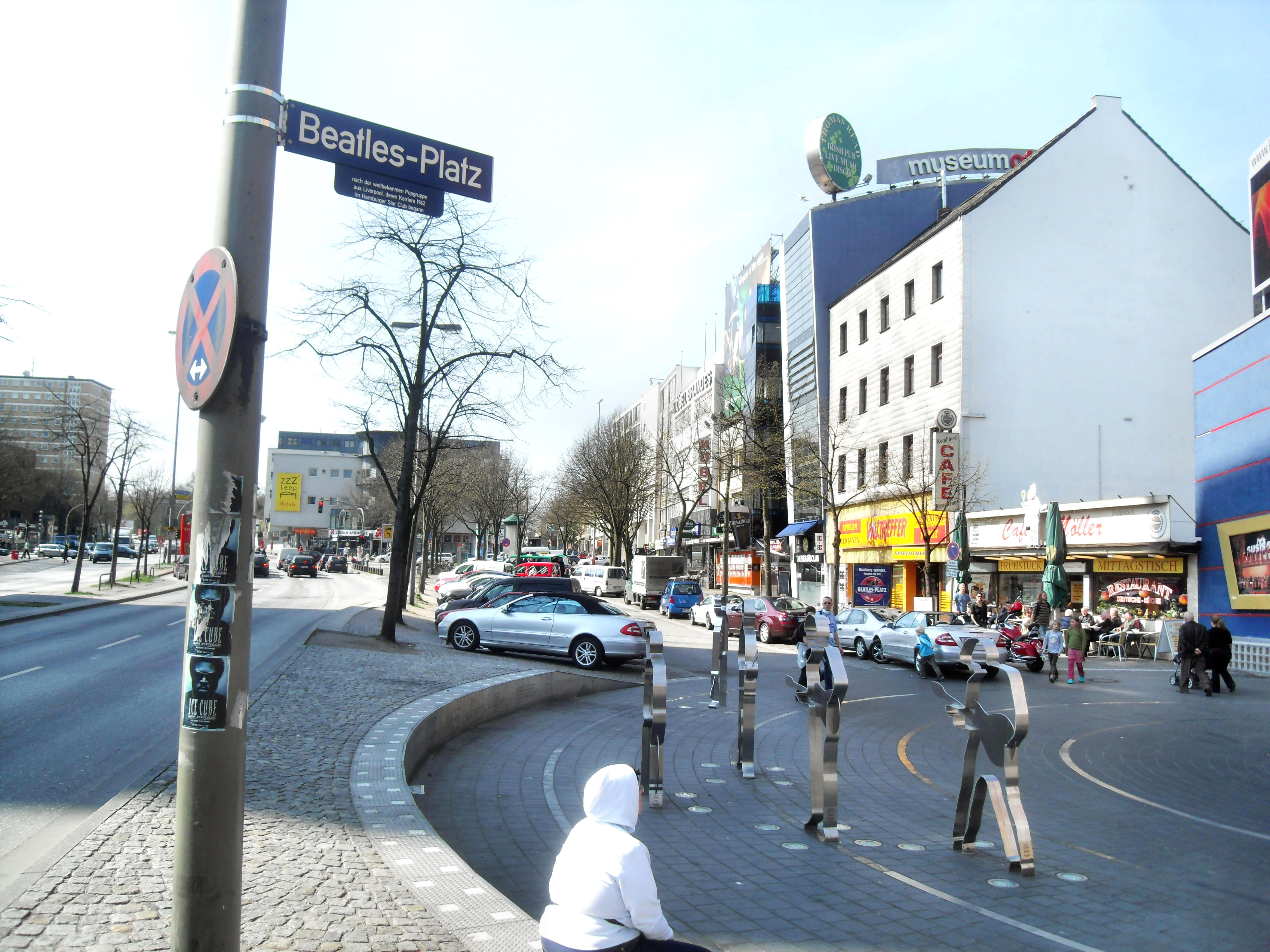 Der Beatles-Platz in Hamburg-St. Pauli in Deutschland